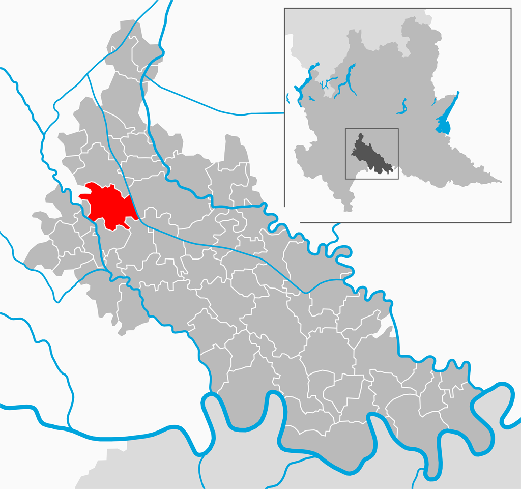 Il comune di Lodi Vecchio nella provincia di Lodi